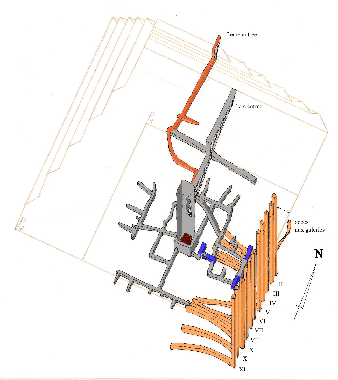 Vue axonométrique des infrastructures de la pyramide de Djoser à Saqqarah